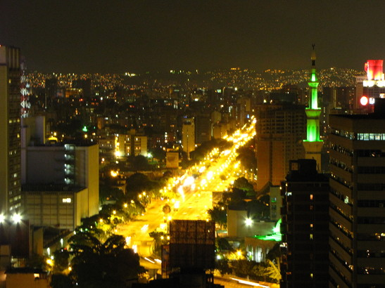 Lugar / place / lieu : Caracas, Venezuela.